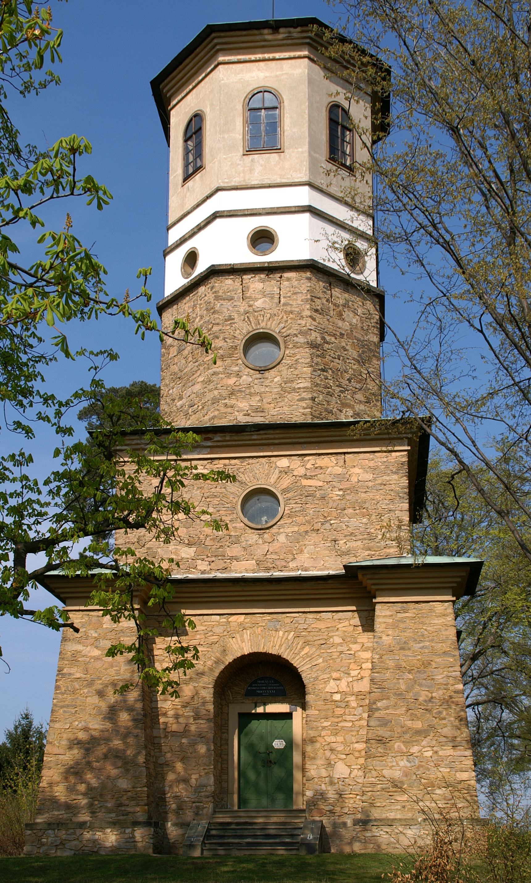 Rozhledna Babylon na Zeleném kopci u Kladerub nad Oslavou